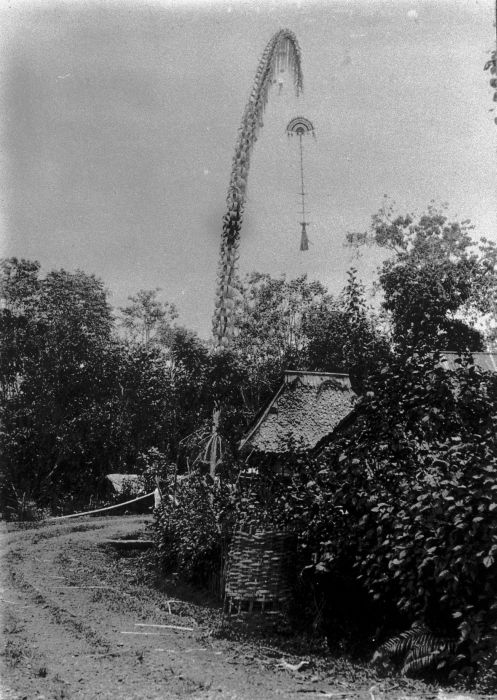 Foto. Bali, Poempoean, staande versiering ter aanduiding van een religieuze of rituele gebeurtenis